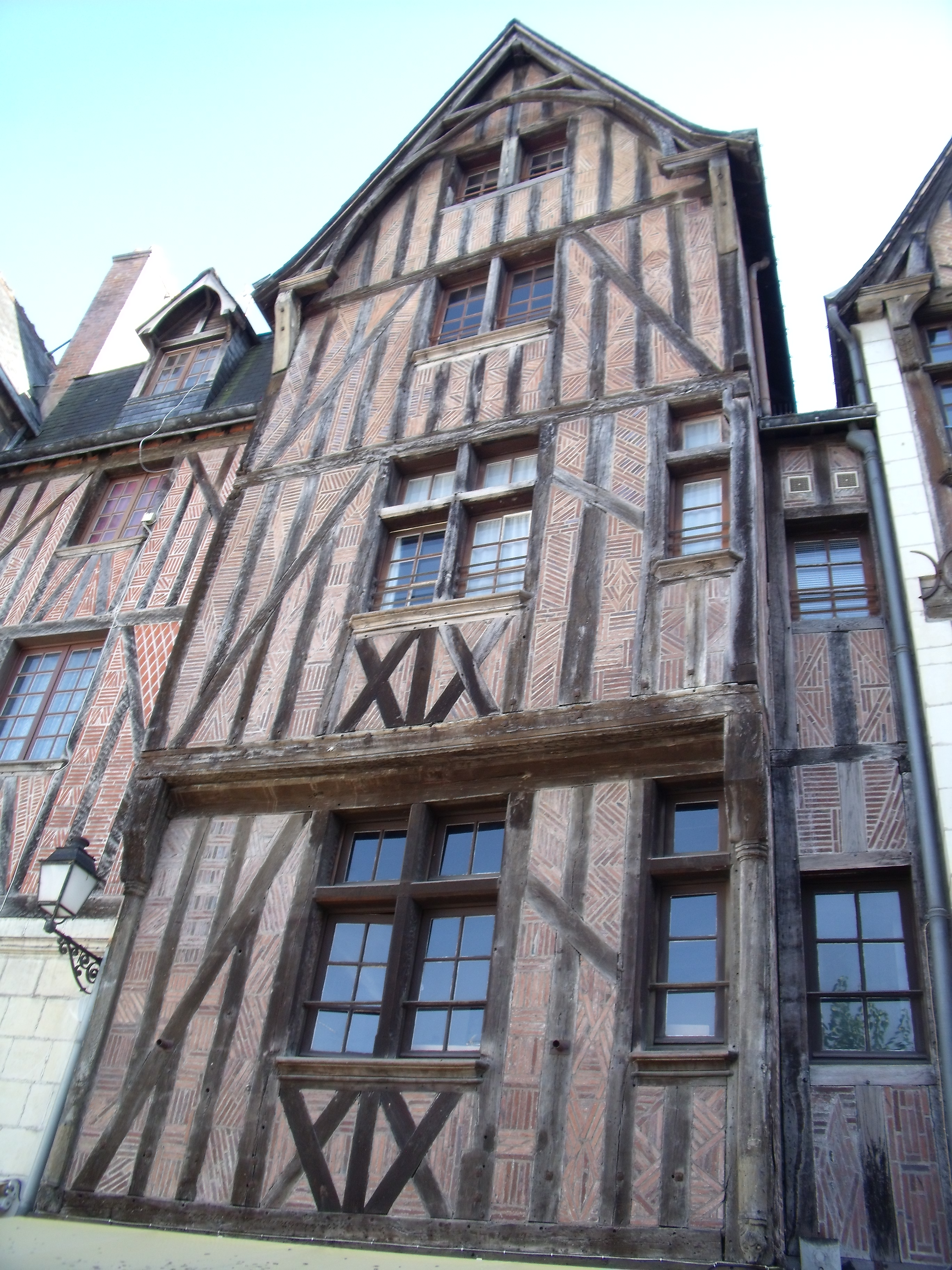 maison XVém siècle, date de restauration 1967, place Plumereau